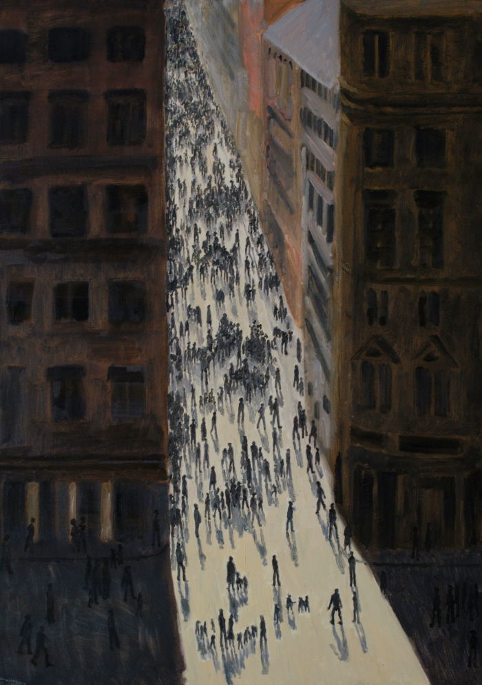 Via Condotti, Rome, painted from The Spanish Stairs